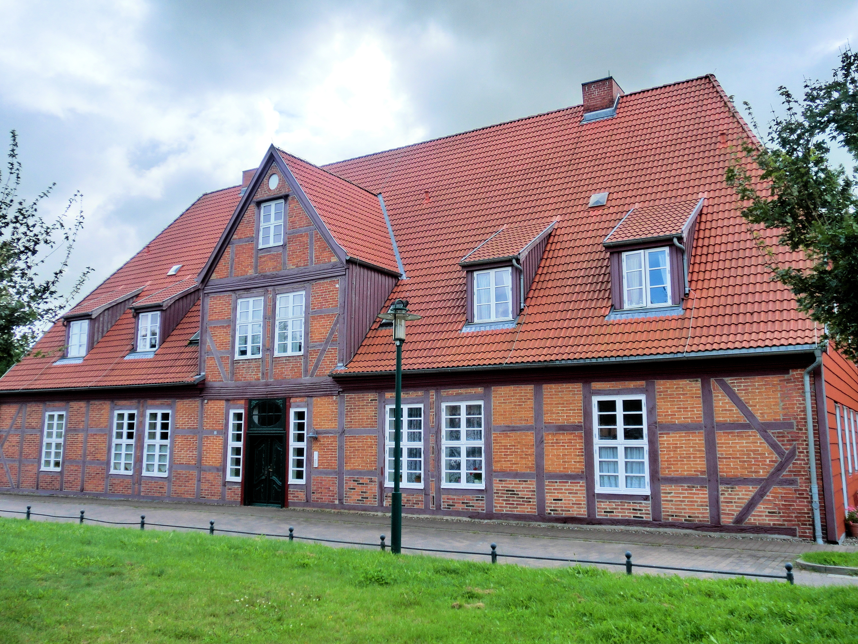 Bad Doberan, Kammerhof 1, Baudenkmal